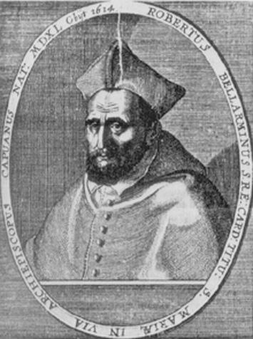 Roberto Francesco Romolo Bellarmino (* 1542 in Montepulciano, † 1621 in Rom)